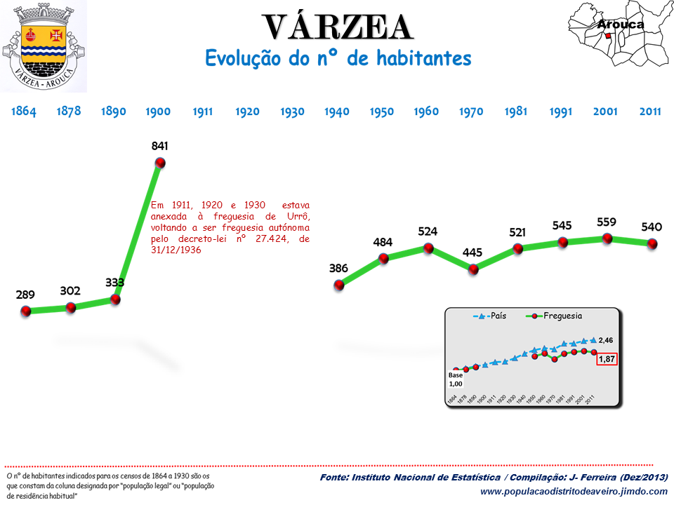 Evolução da População 1864 / 2011